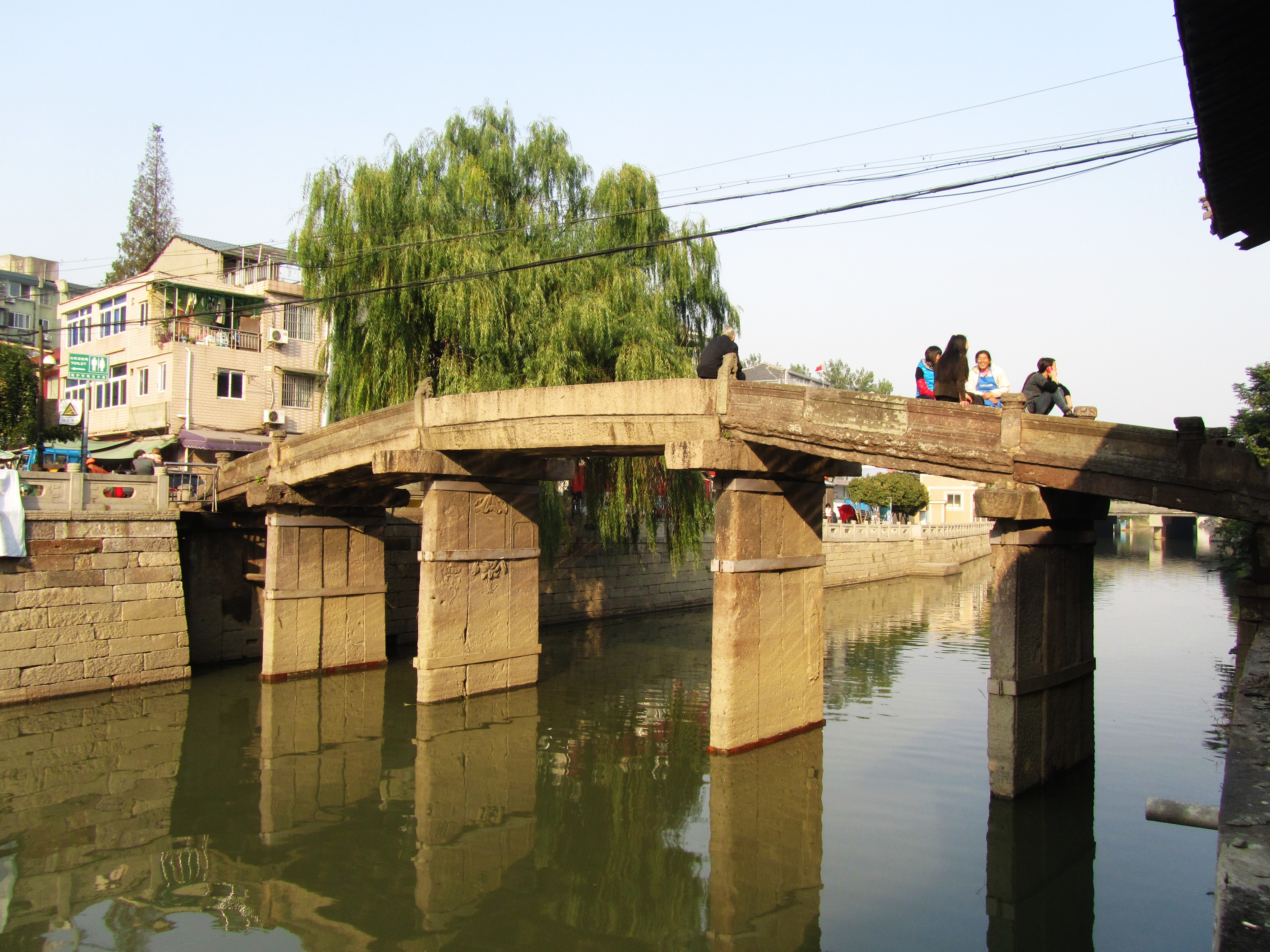 杭州祥符桥，自西南向东北看。